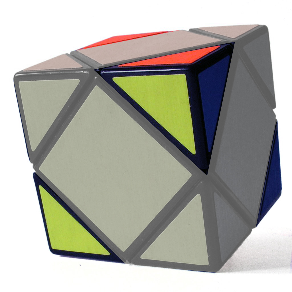 Position der im Inneren miteinander fest verbundenen Ecken eines Skewb. Datei ist eine Bearbeitung von mini von user:Andreas.Roever